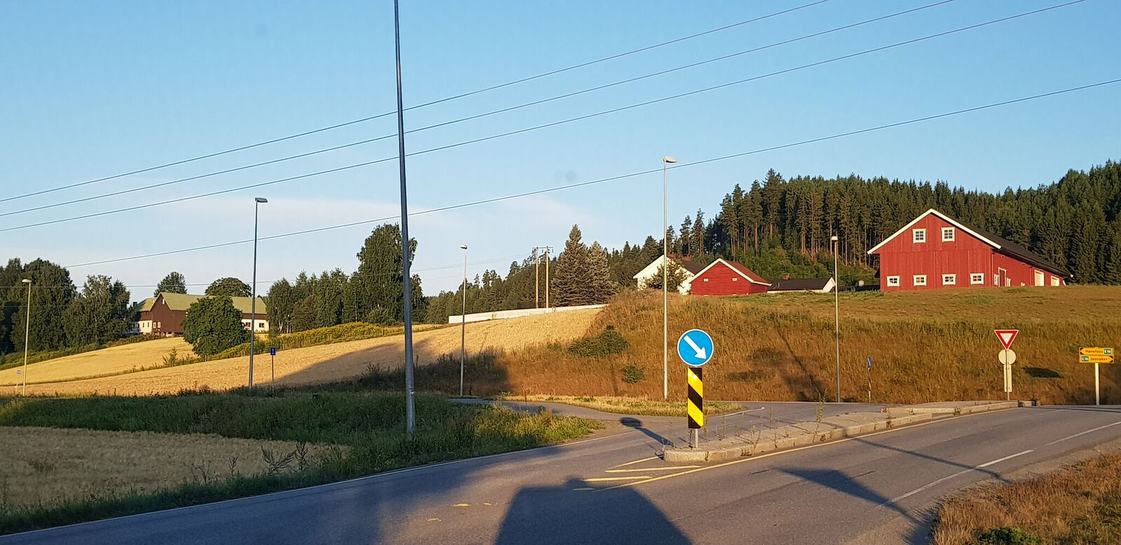 Sett østfra. Øvre Alme til venstre, Nordre Alme til høyre